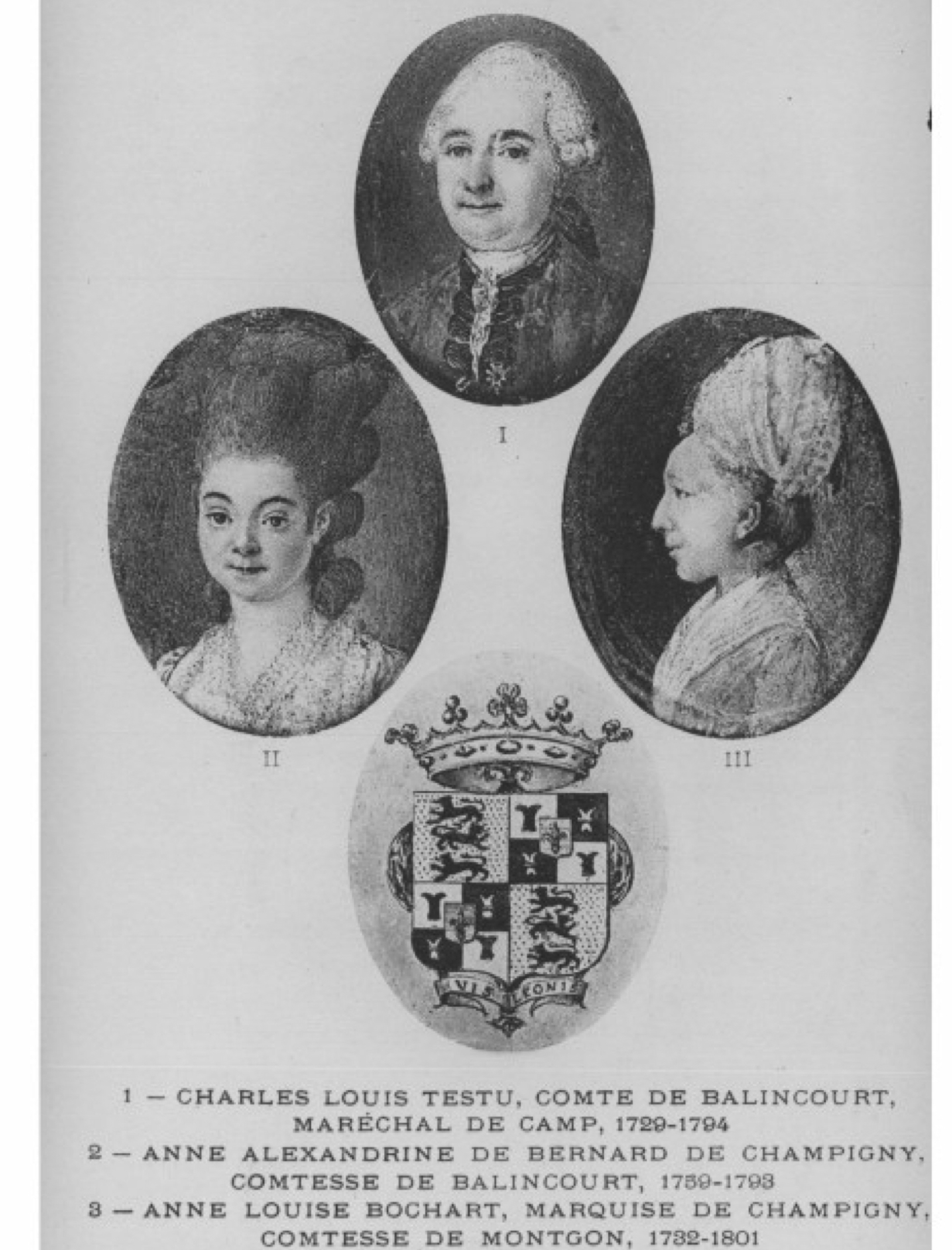 Portraits du comte Charles-Louis Testu de Balincourt et de sa seconde épouse qui meurt à la prison de Sens en 1793.